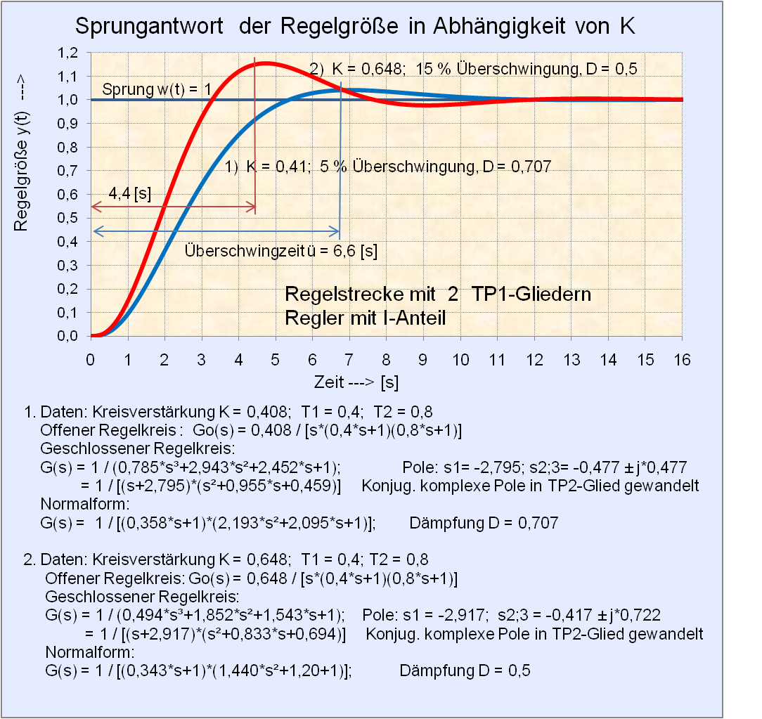 Sprungantwort Regelkreis mit Polzuweisung als Funktion der Kreisverstärkung